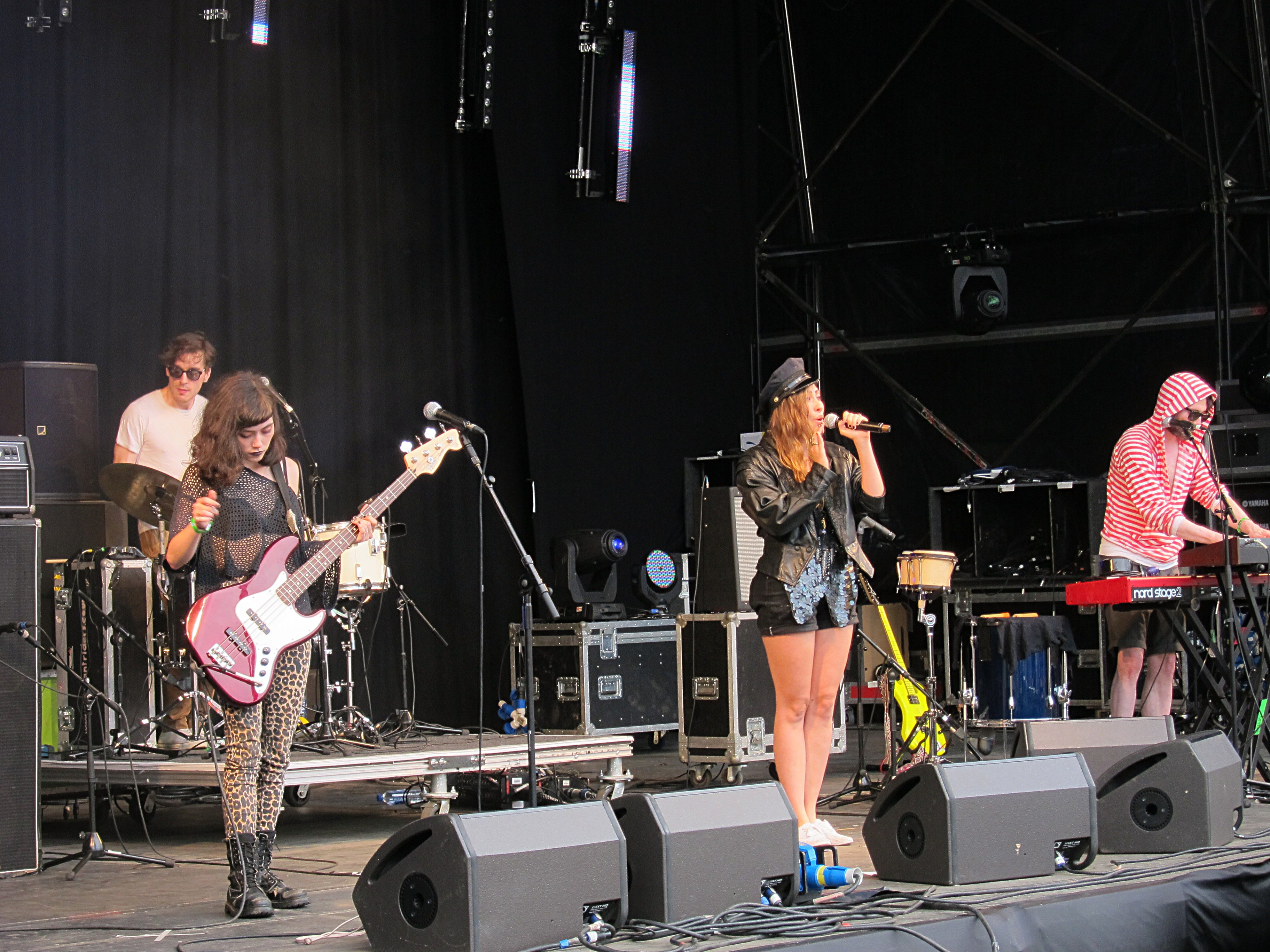 Friends, Main Stage, Summer Sundae Festival, Leicester, 18 August 2012